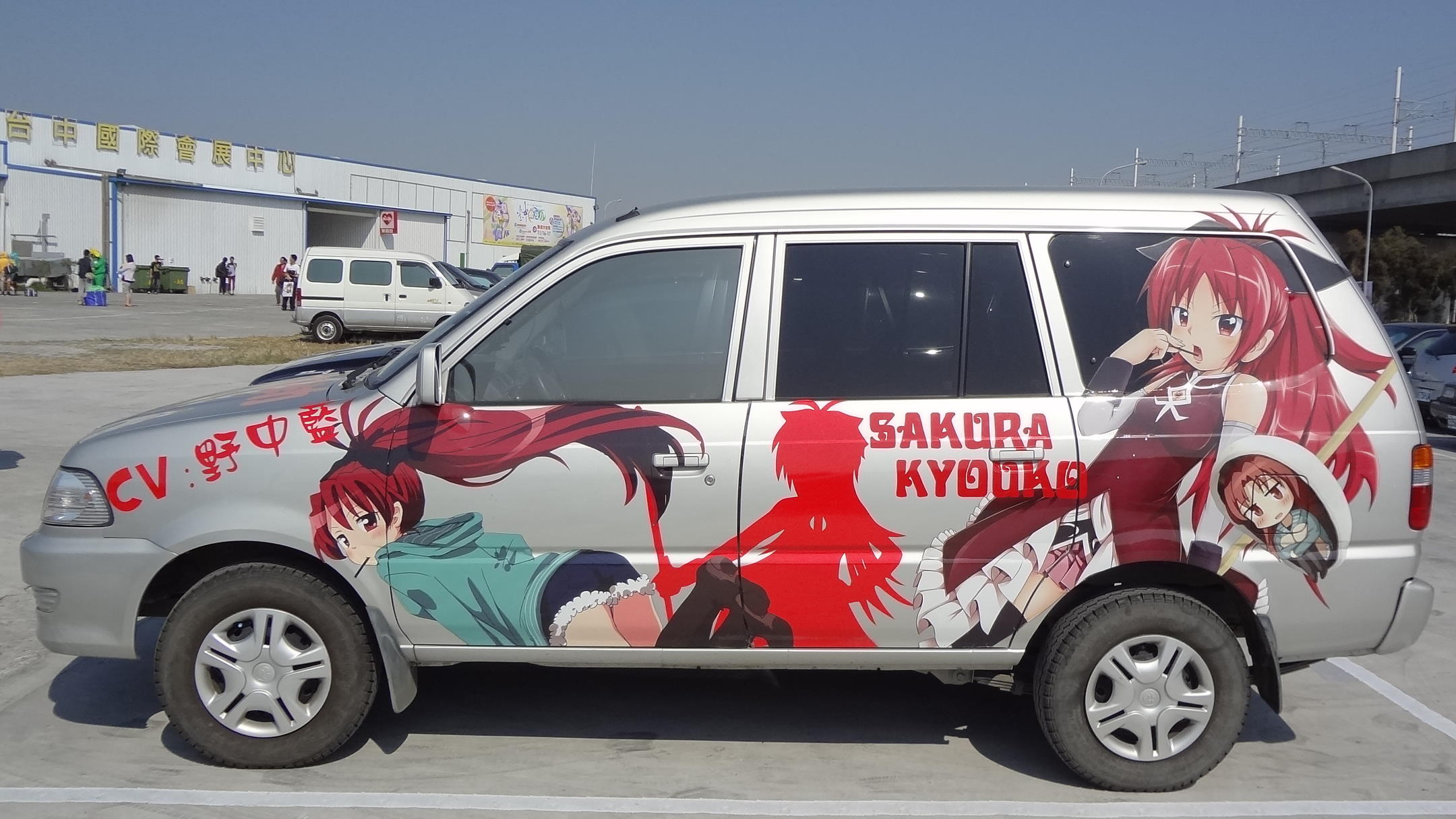 中文（台灣）: 2013臺中動漫節，停在大臺中國際會展中心外的豐田瑞獅Surf DX《魔法少女小圓》痛車左側外觀。